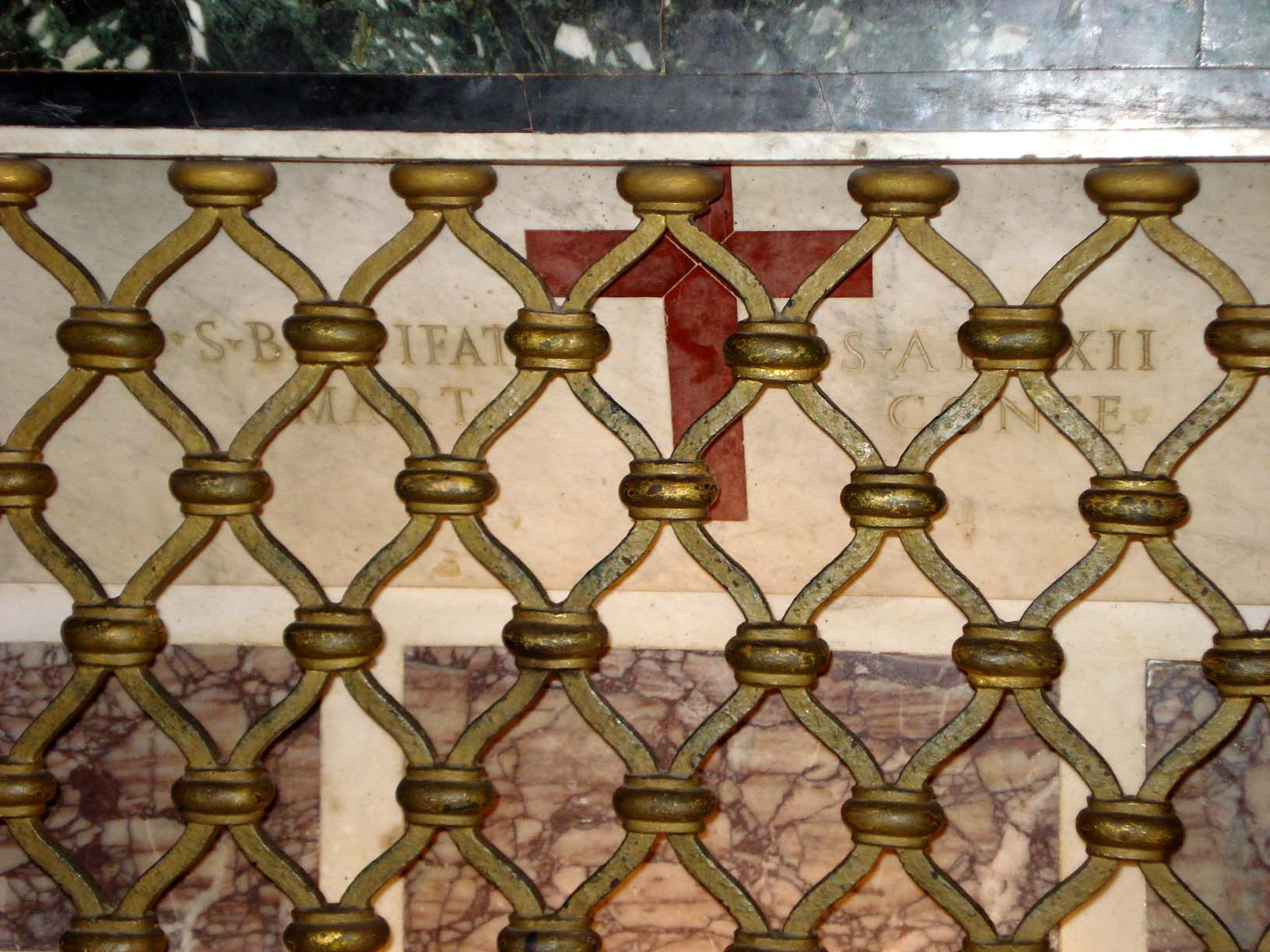 relics of Alexius of Rome and Saint Bonifatio. Basilica Santi Bonifacio e Alessio (Rome). Мощи свв. мученика Вонифатия и Алексия человека Божия